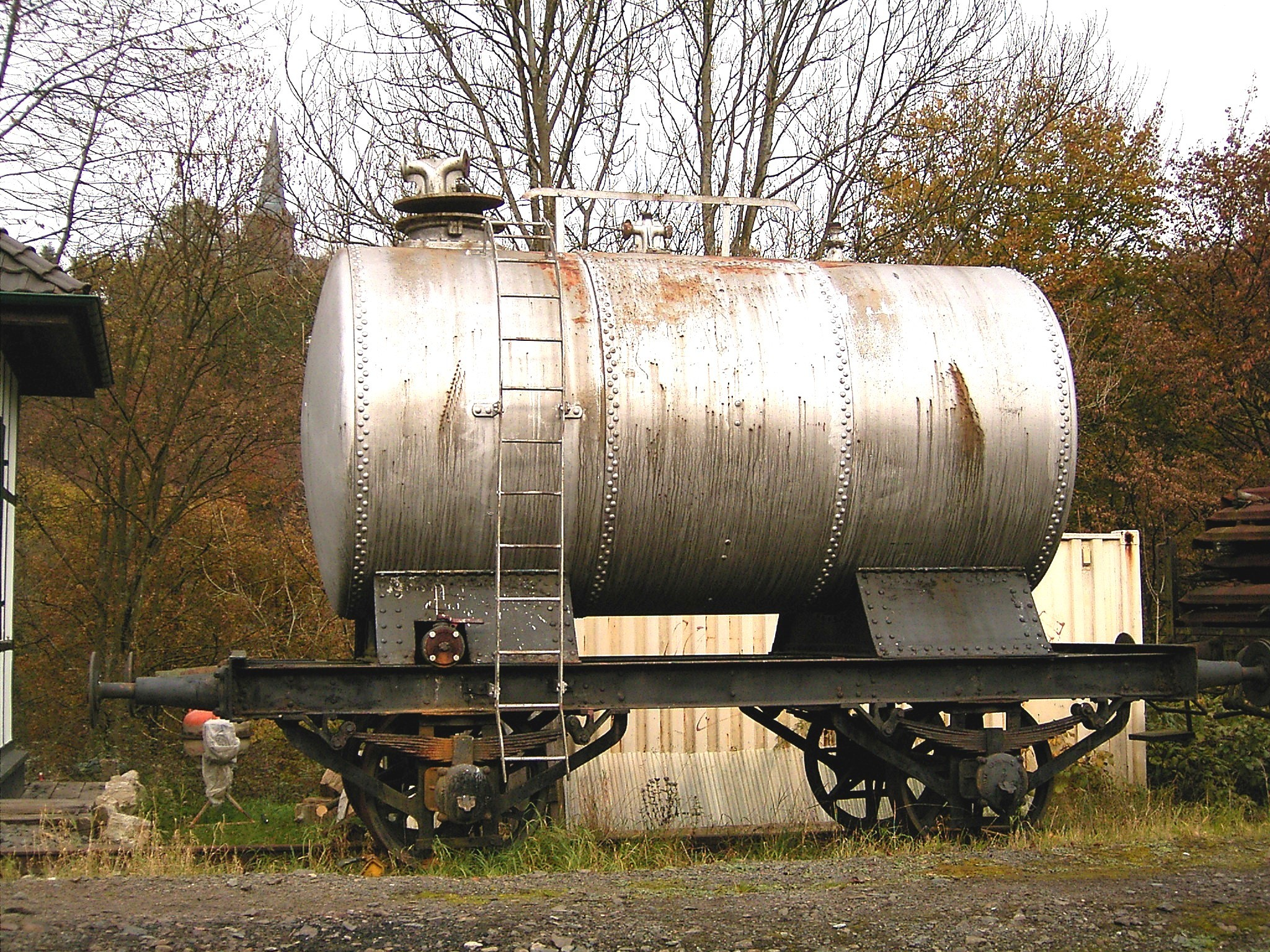 Radevormwald